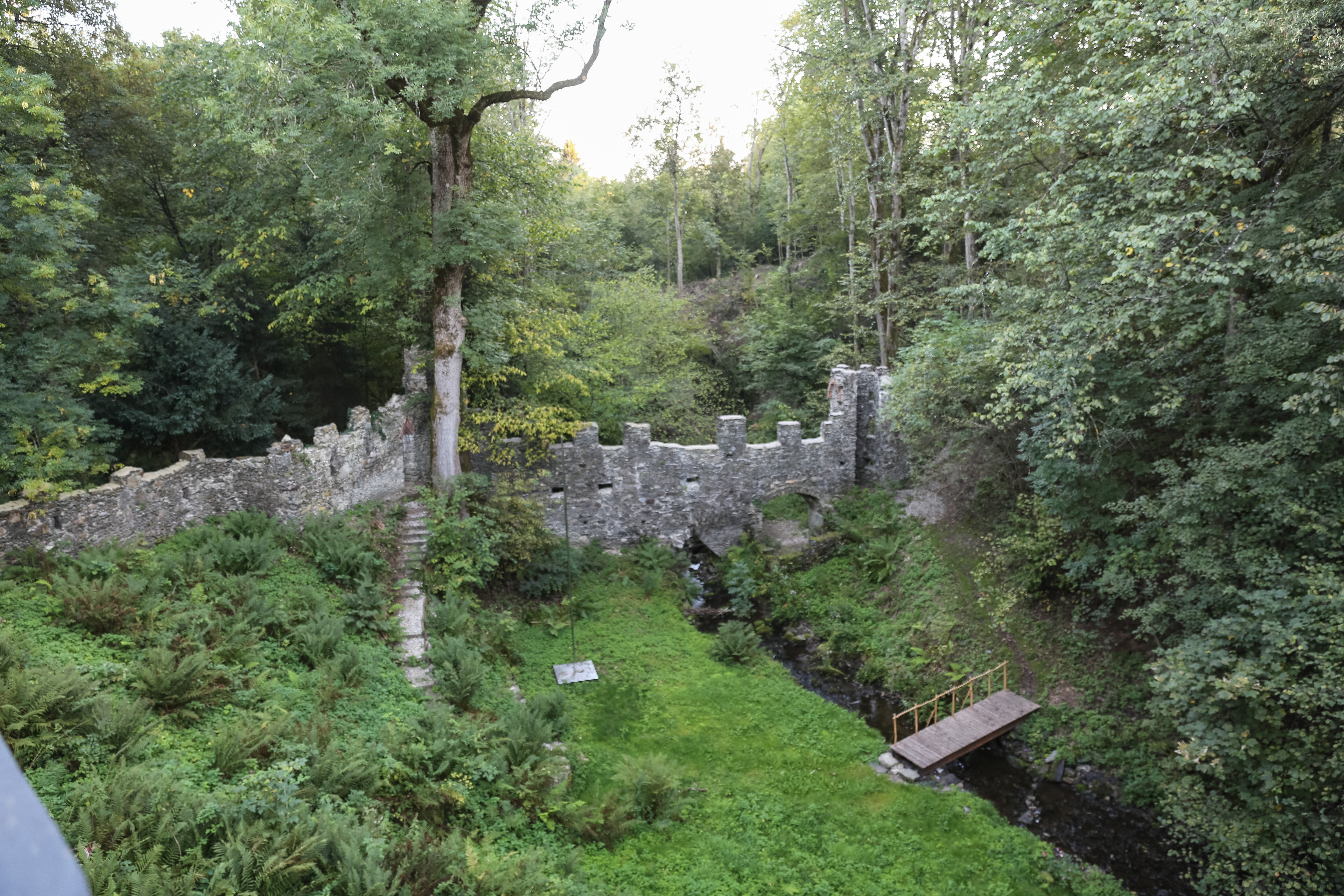 Schloss Damtschach mit Parkanlage, Damtschach, Gemeinde Wernberg. Dieses Foto wurde im Rahmen des von Wikimedia Österreich unterstützten Projekts: Wörthersee 2013 erstellt. Künstliche Ruinen im südlichen Teil des Schlossparks, restauriert. Errichtet um 1830